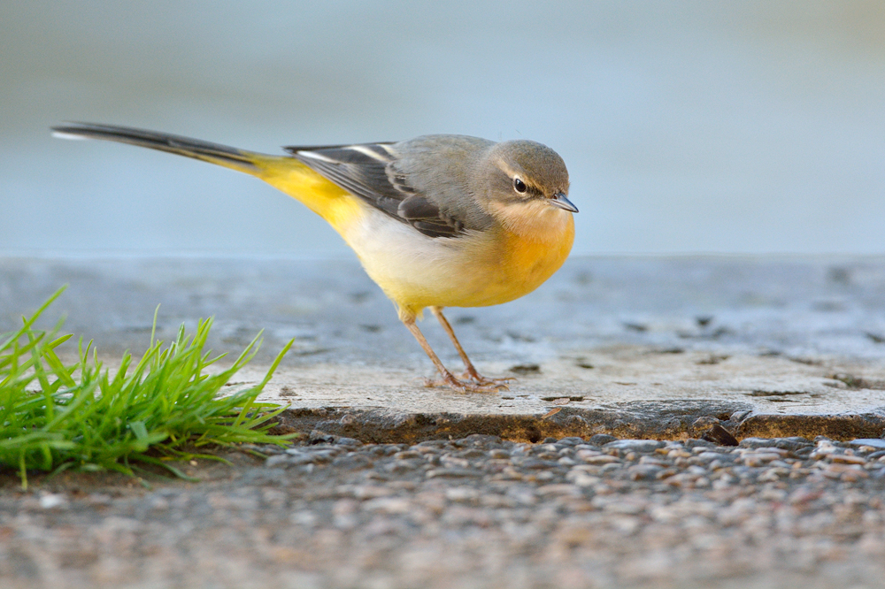 Motacilla cinerea (Quai des Tuileries, Paris - France)